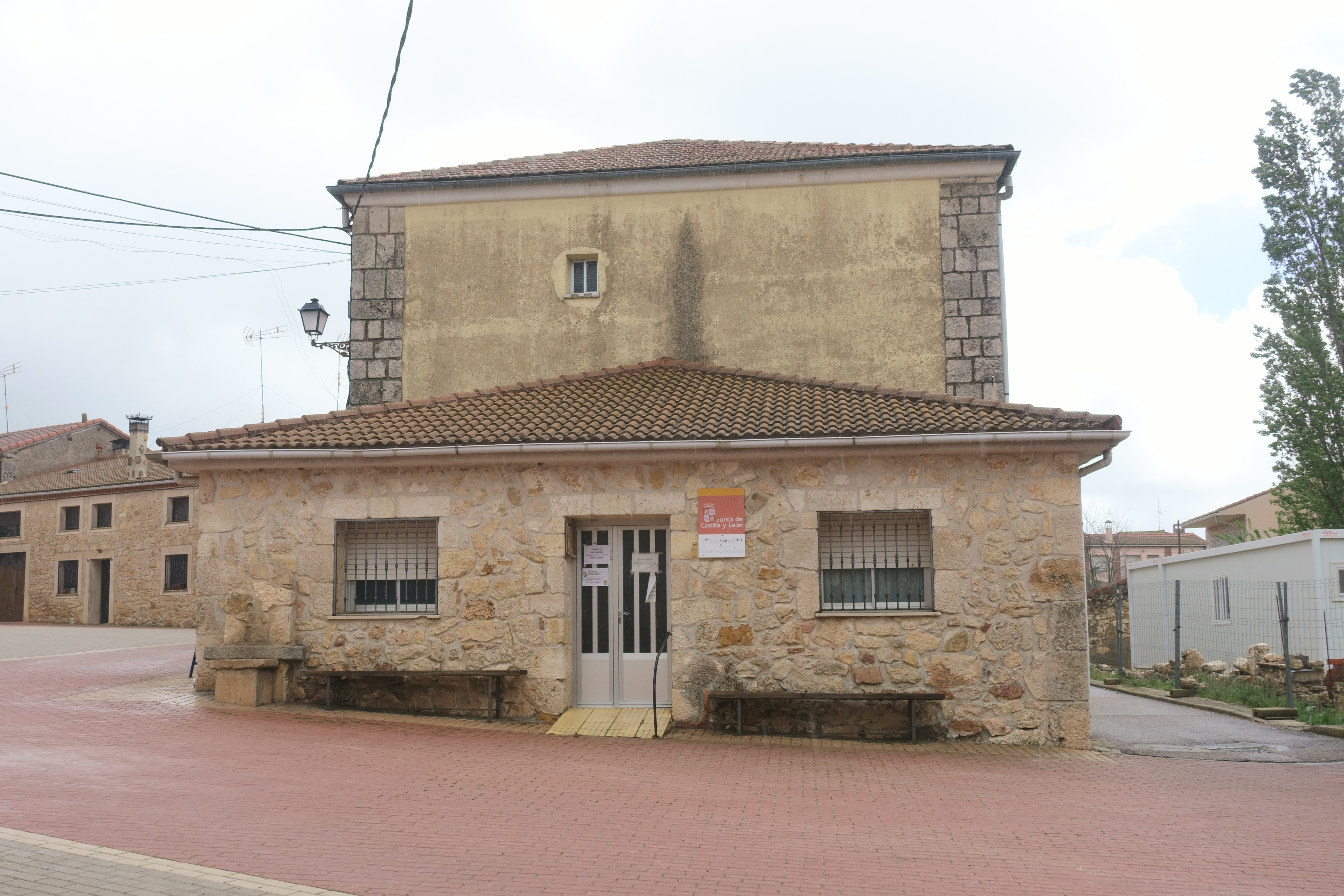 Consultorio médico en Castro de Fuentidueña (Segovia, España).